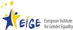 Оригінальна назва- European Institute for Gender Equality Дата заснування- 20 грудня 2006 року Тип -громадська організація Мета діяльності- розвиток громад, культура, навчання Голова -Віргінія Лангбакк (Virginija Langbakk) Положення -Литва, Вільнюс Офіційний сайт